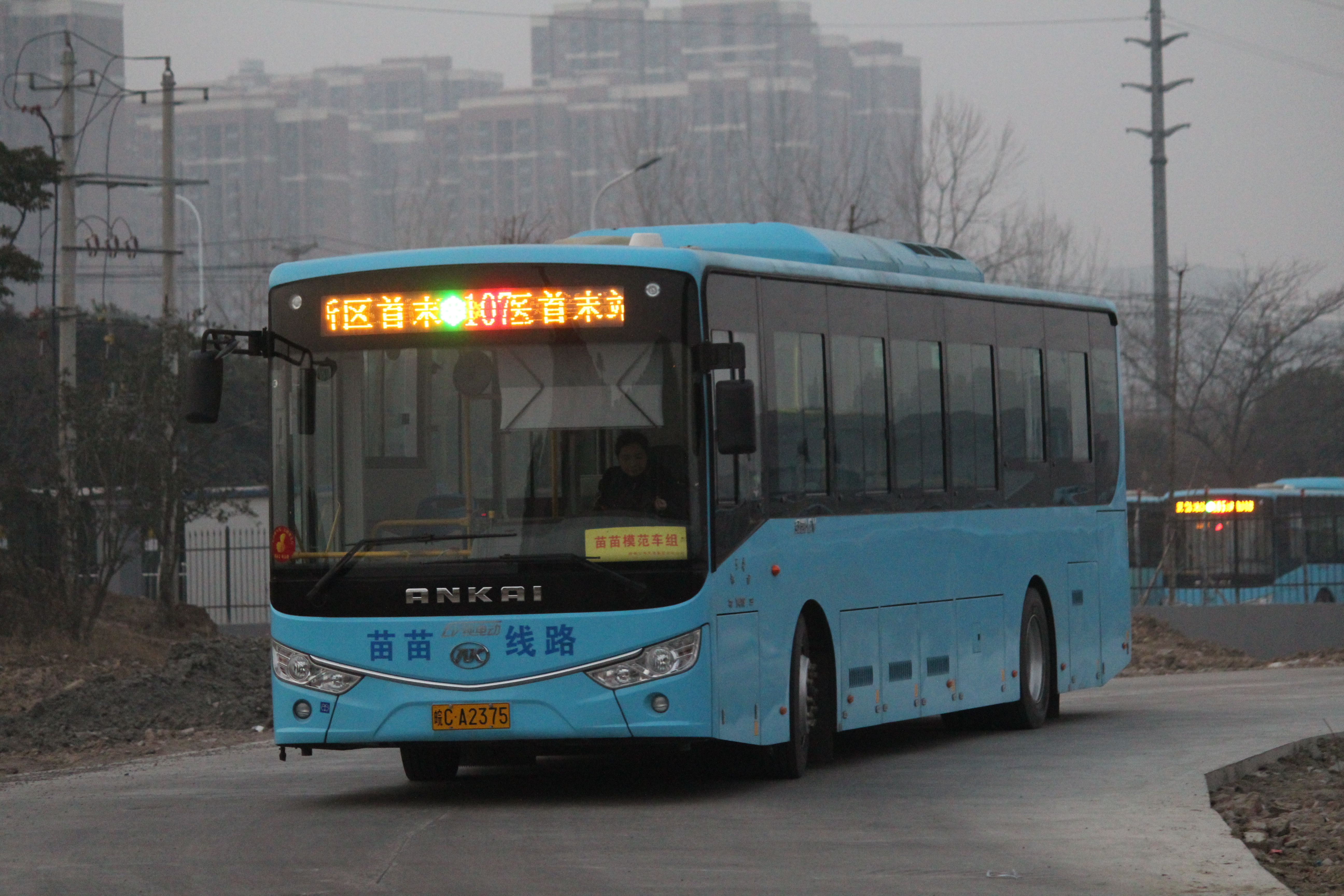 中文（中国大陆）: Bengbu Bus No.107 in Binhu New District Sta.